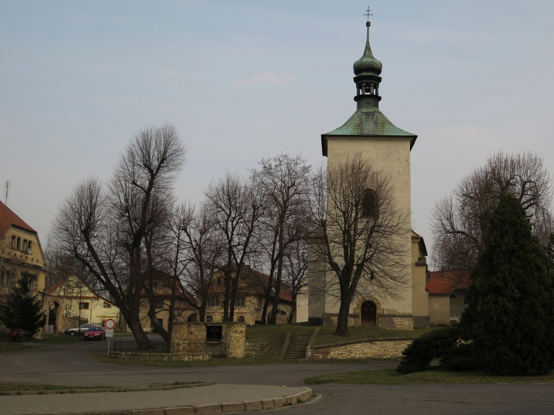 Kostel sv. Matouše (Křešice), Křešice.